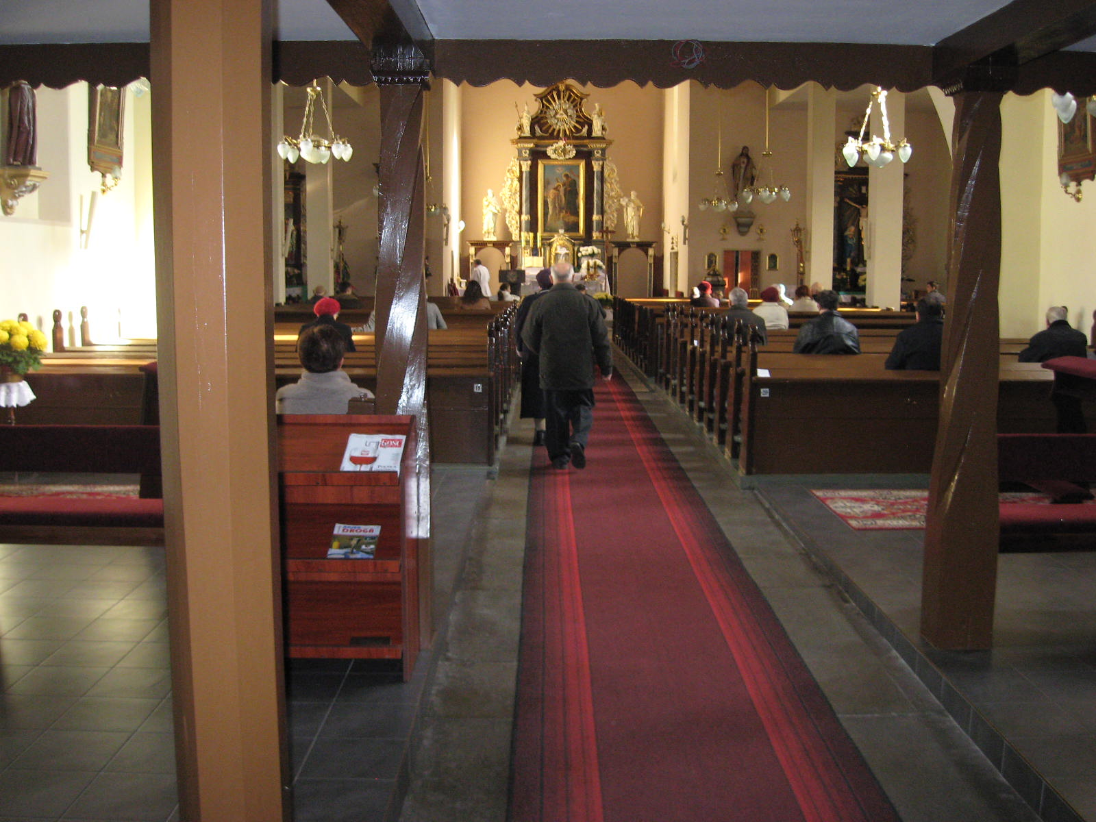 Nawa główna...w głębi prezbiterium z ołtarzem głównym